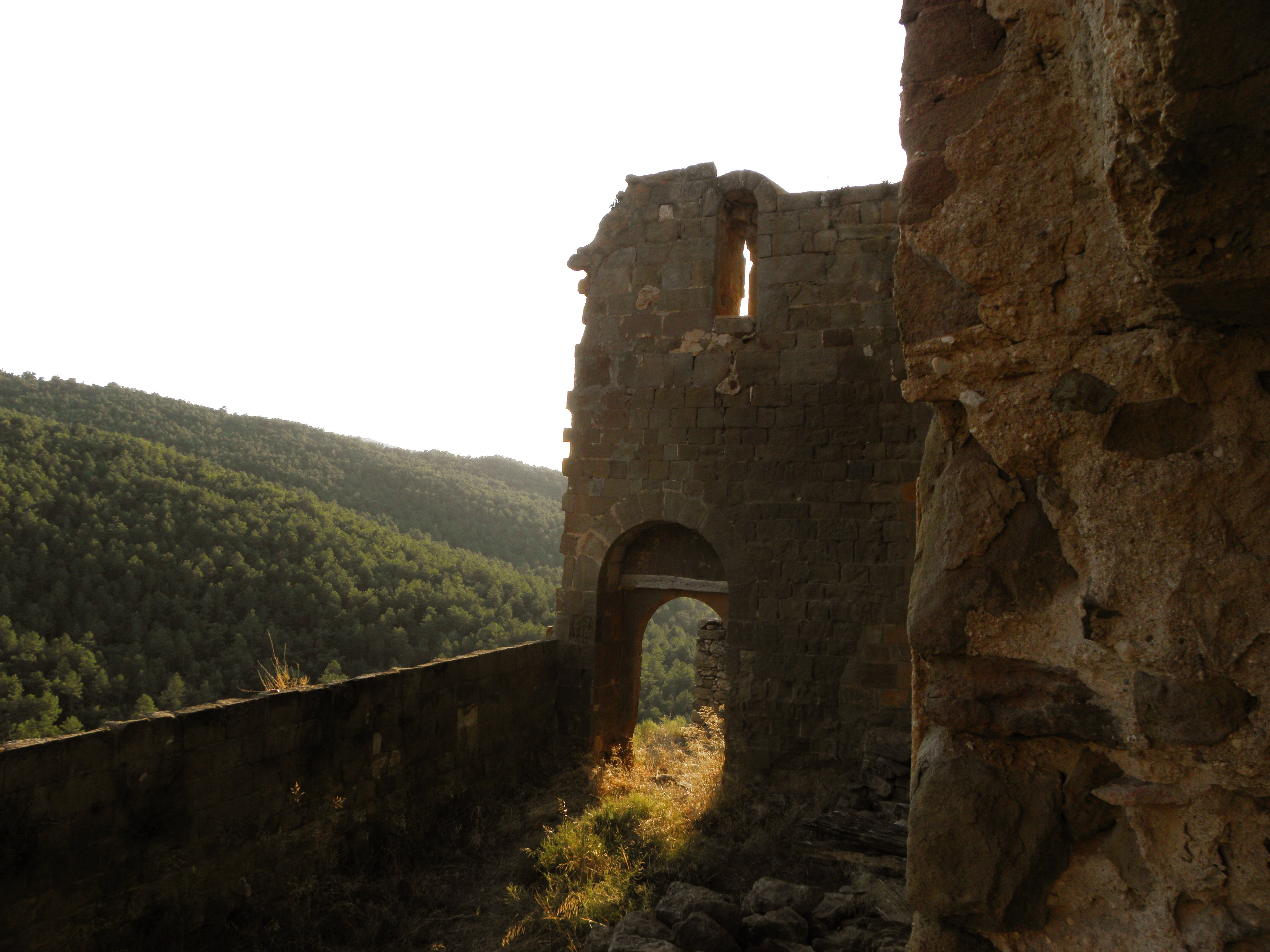 Església antiga de Sant Pere de Madrona (Pinell de Solsonès). L'interior del frontis.